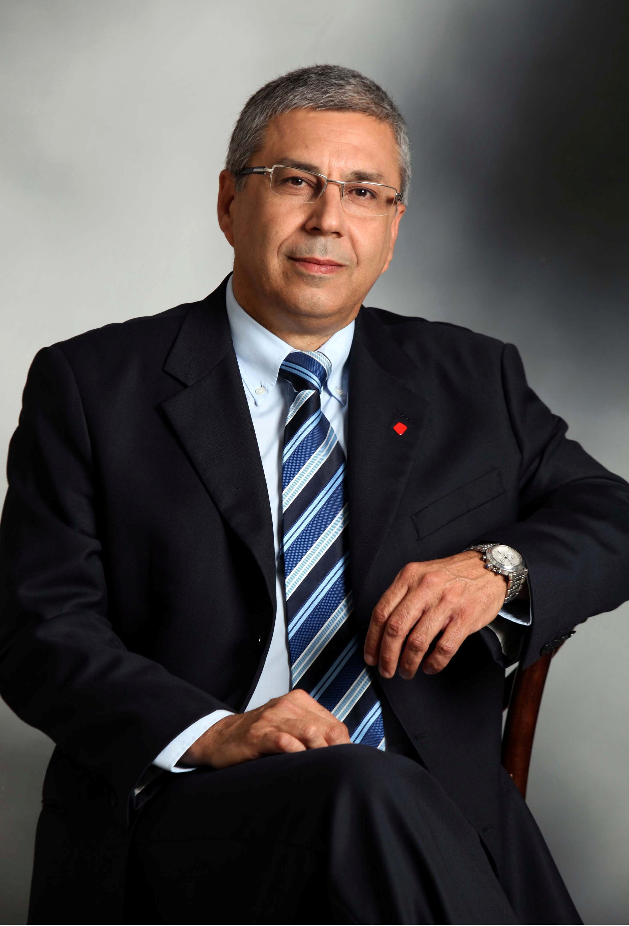 מנכל בנק הפועלים